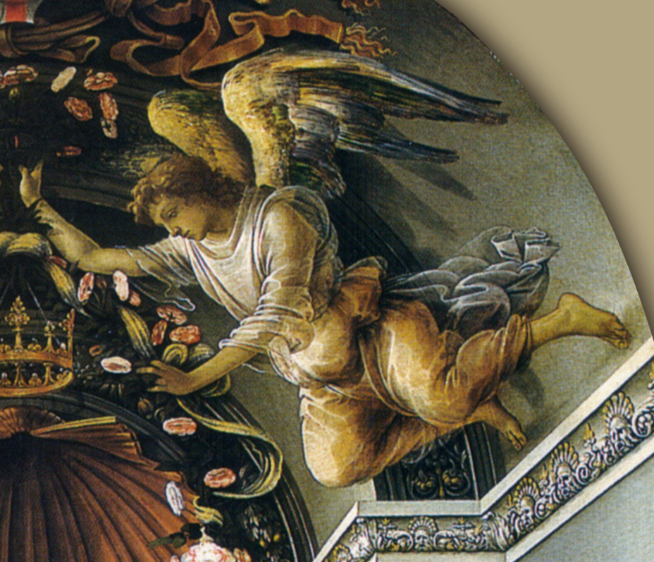 Detalhes do Retábulo da Sala Degli Otto, Florença